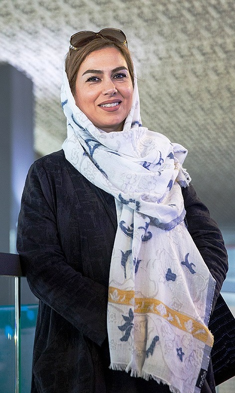 سی‌و‌هفتمین جشنواره جهانی فیلم فجر